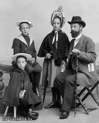 На фотографии: Сергей Чоколов (сидит, родился 18.09.1892), Дмитрий, Наталья и Семён Петрович Чоколов (1848—1921)